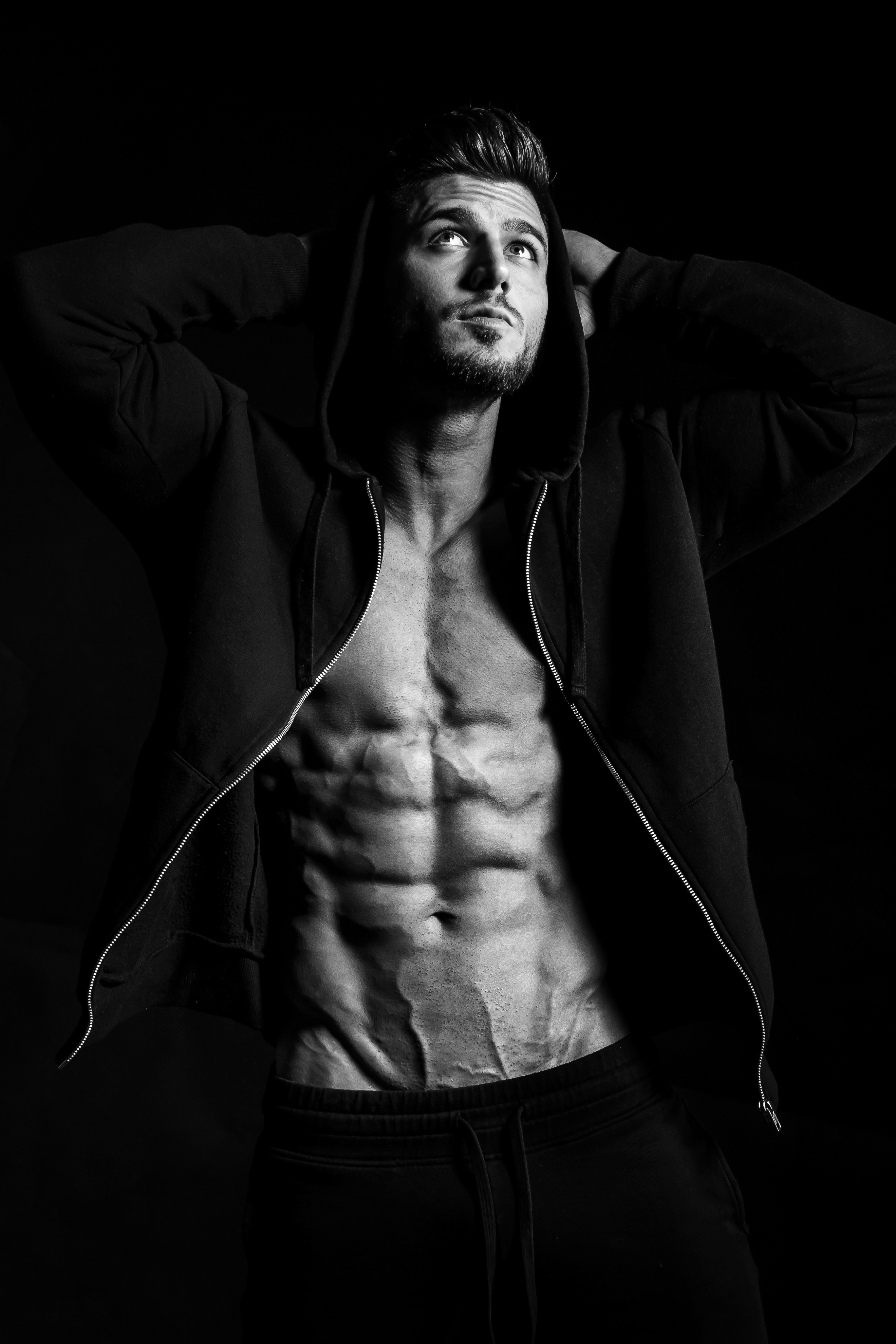 fotózás 2016